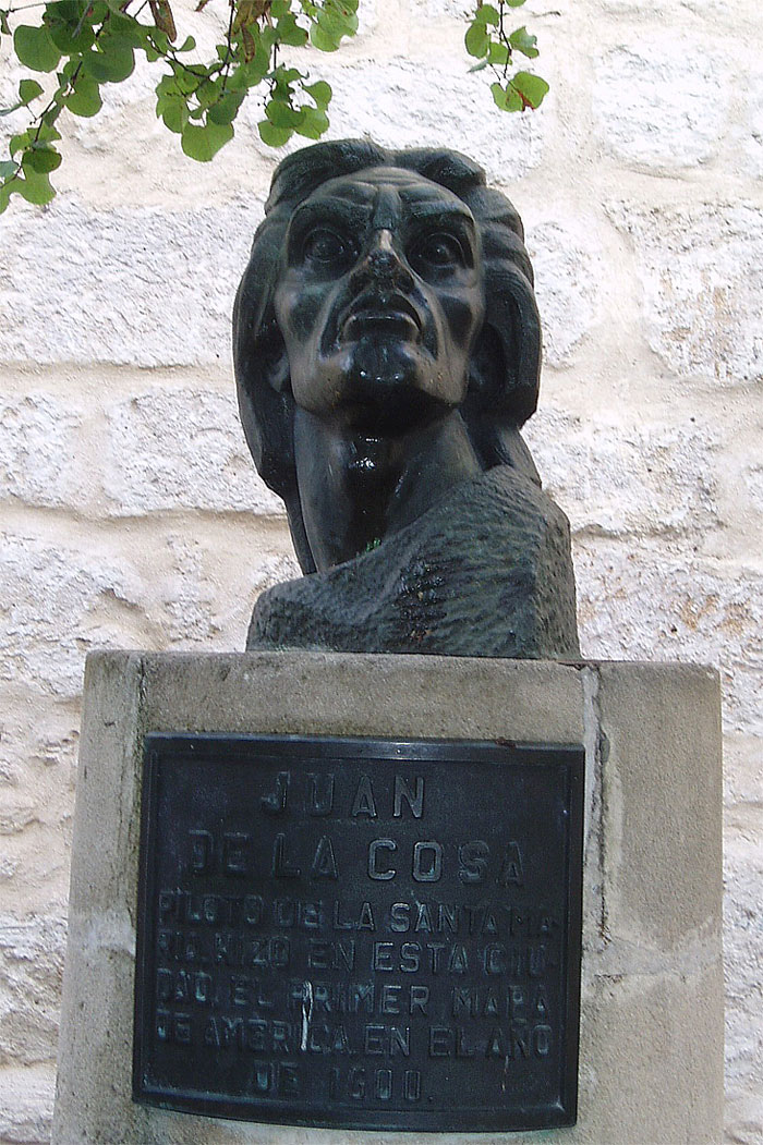 Busto dedicado al navegante y cartógrafo Juan de la Cosa en El Puerto de Santa María, España.